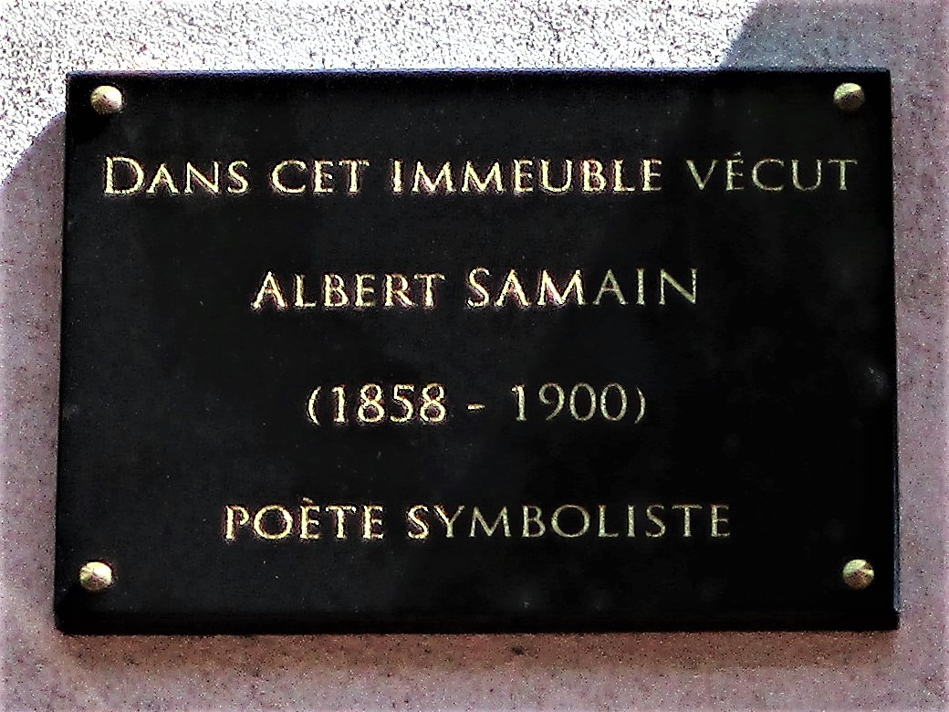 PLAQUE COMMEMORATIVE APPOSEE 16, RUE SAINT-MARTIN, À PARIS, PAR CHRISTOPHE CARRÈRE.